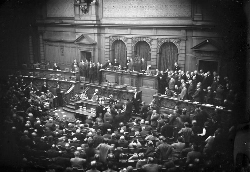 Die bedeutsame Reichstags-Sitzung am 12. September 1932 welche Reichskanzler von Papen durch ein Dekret des Reichspräsidenten auflöste! Moment-Aufnahme während der historischen Reichstags-Sitzung. Der Präsident des Reichstags der N.Sozialist Hauptmann Göring, gibt die Auflösung des Reichstags bekannt, setzte aber gleichzeitig eine neue Sitzung für den nächsten Tag den 13. September fest.